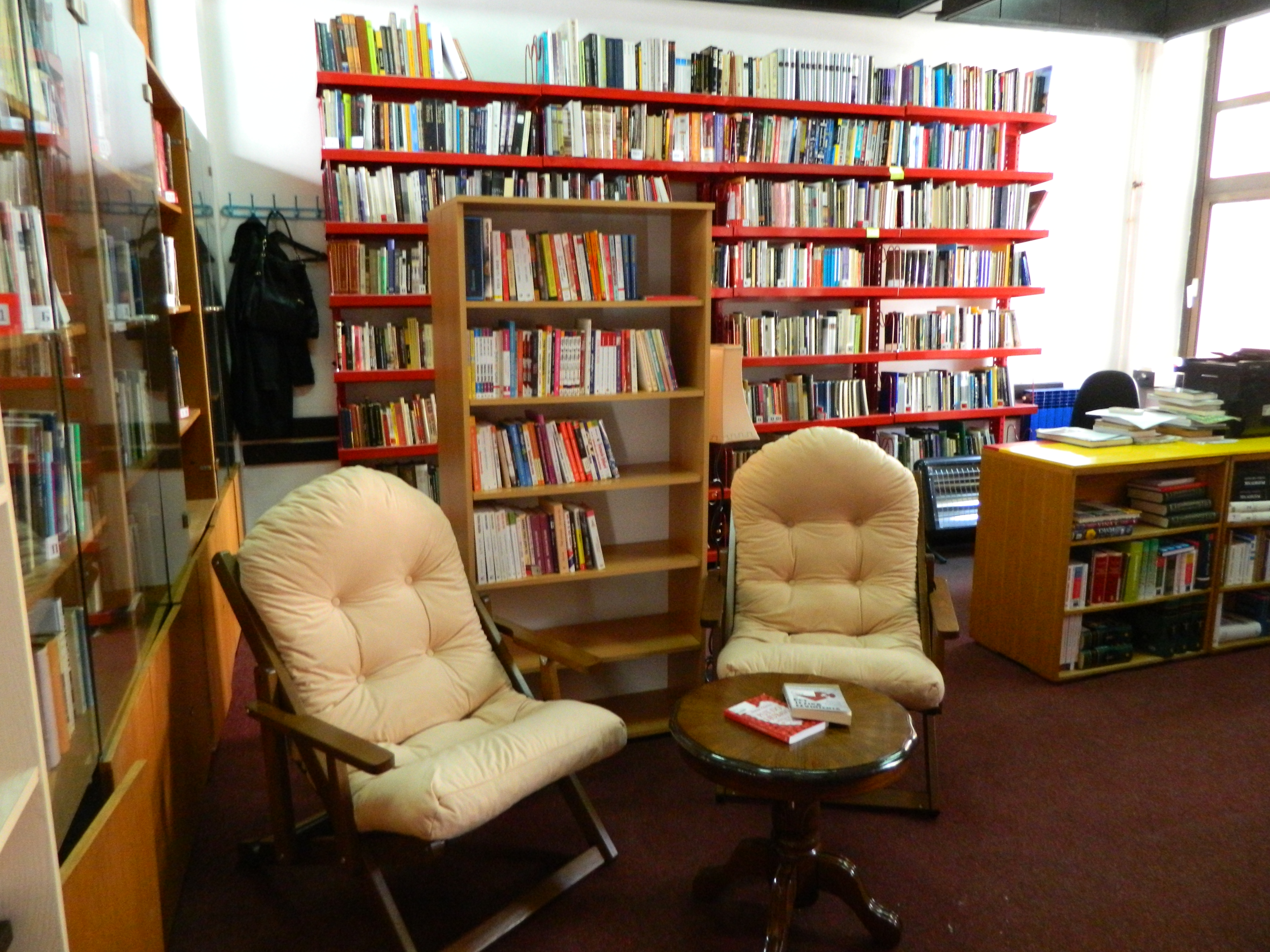 Kutak za odmor